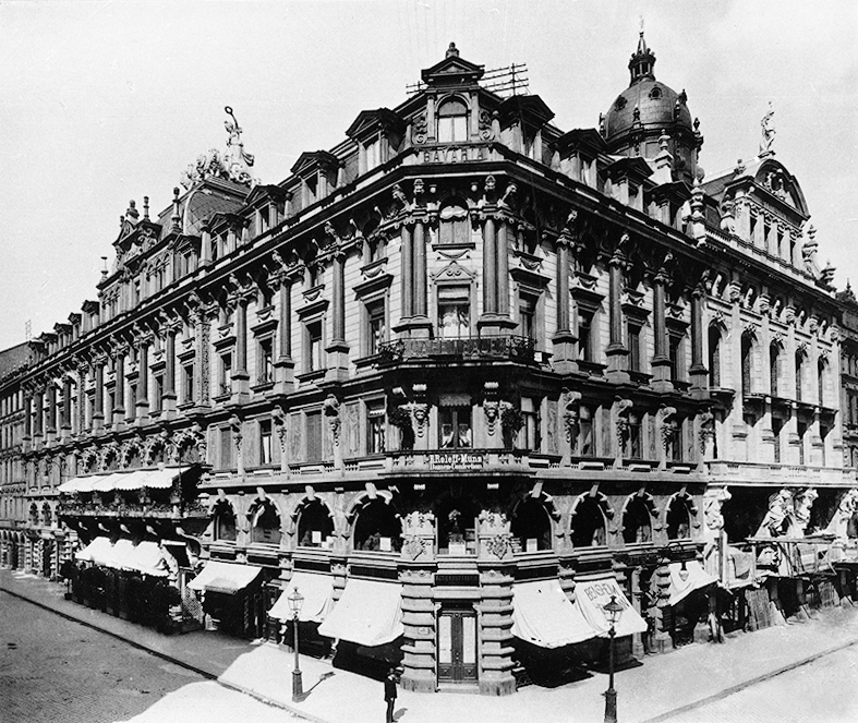 Haus Bavaria 1883-1944, Frankfurt, Schillerplatz / Ecke Schillerstraße. Architekt Simon Ravenstein, Bauherrn Gebrüder Krause aus Mainz. Dachbekrönung eine in Zink gearbeitete Bavaria-Statue auf einer Löwenquadriga stehend des Schweizer Künstler Gustav Herold (1839-1927). Standort des berühmten Frankfurter Café Bauers des Wiener Cafetiers Matias Bauer, der bereits in Berlin seit 1877 das gleichnamige Café Bauer (Berlin) betrieb. Rechts das im Bau befindliche ALEMANNIA Haus mit seine auf dem Segmentgiebel befindlichen Alemannia-Figur und seiner hohen, alle Gebäude überragenden fackelbekrönten Dachkuppel. Im Zweiten Weltkrieg brannten alle Gebäude durch Fliegerbomben aus.